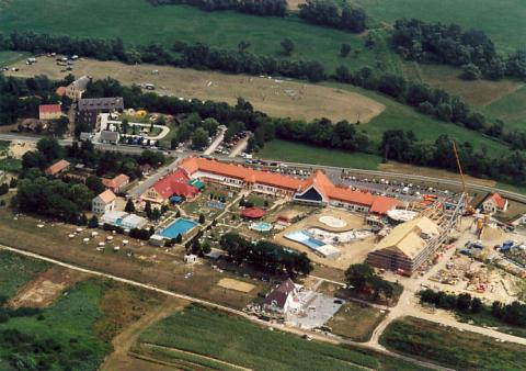 Kehidakustány, Hungary, aerial photography